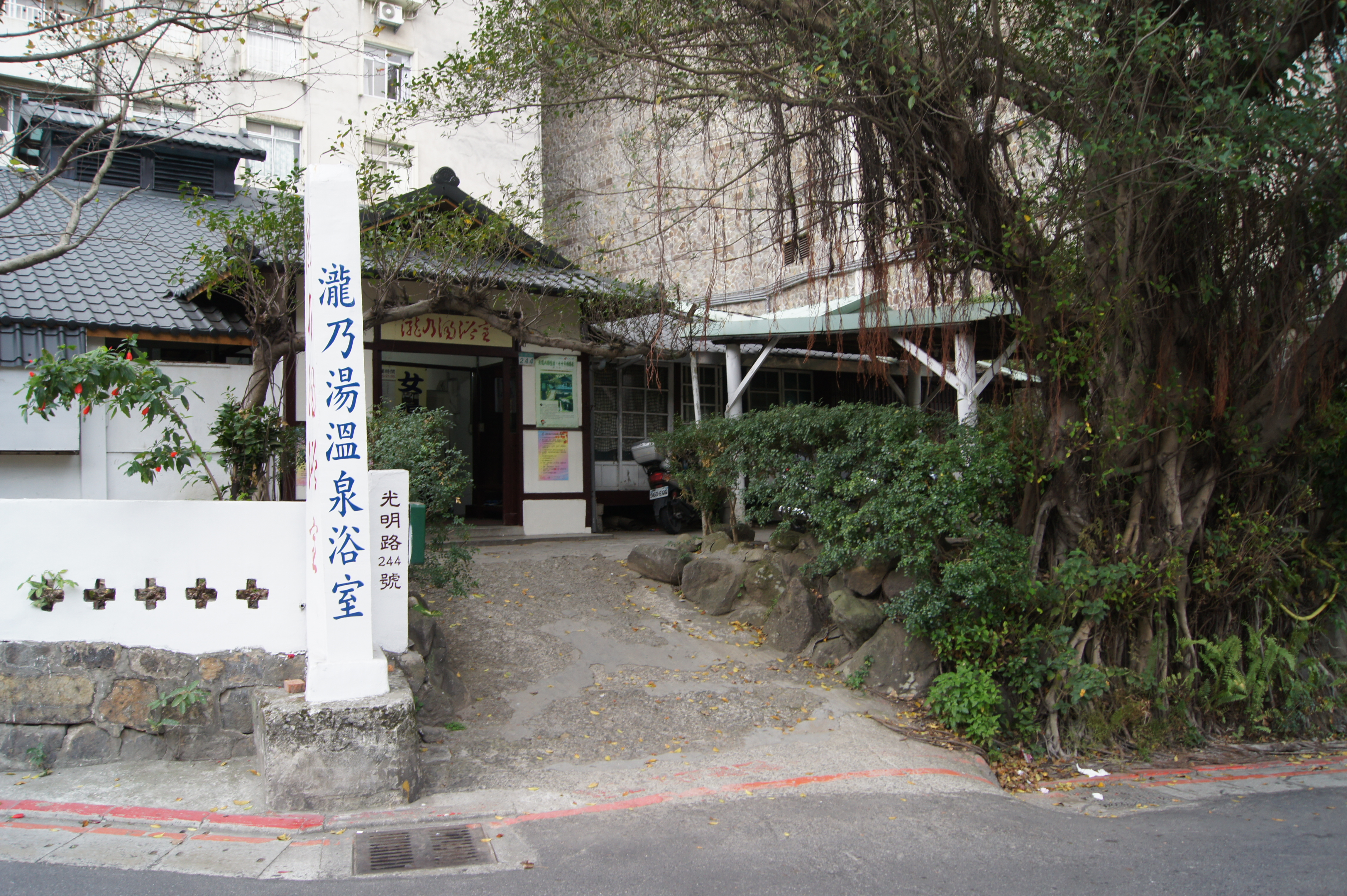 瀧乃湯外観。